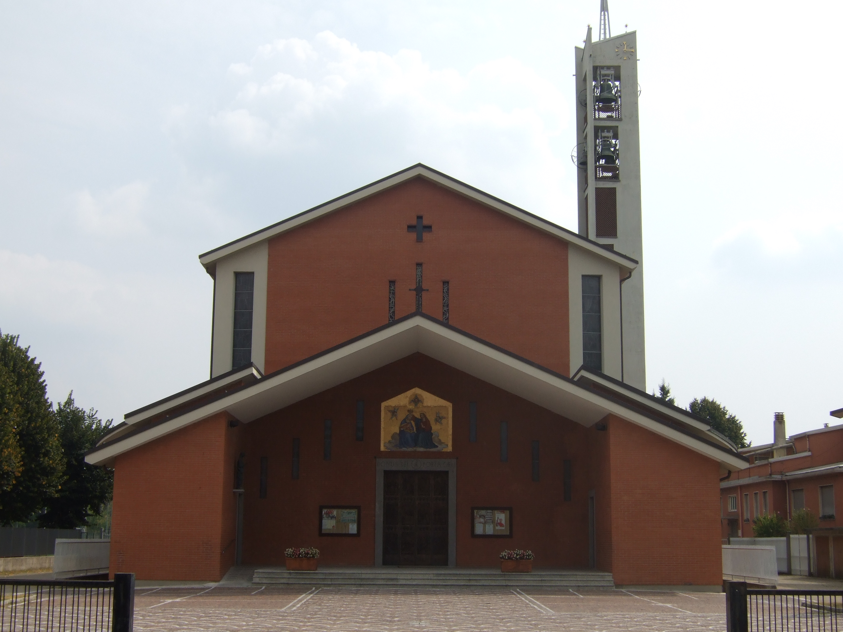 Chiesa parrocchiale San Giuseppe di Taccona